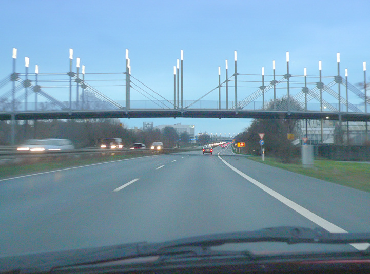 Brücke-Ost, Fußgängerbrücke am EXPO-Gelände Hannover Foto aufgenommen von Benutzer Benutzer:AxelHH, Januar 2007